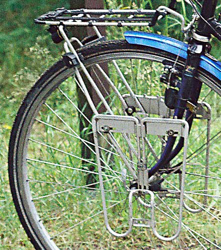 Autor: Ralf Roletschek Marcela GNU-FDL (selbst aufgenommen)